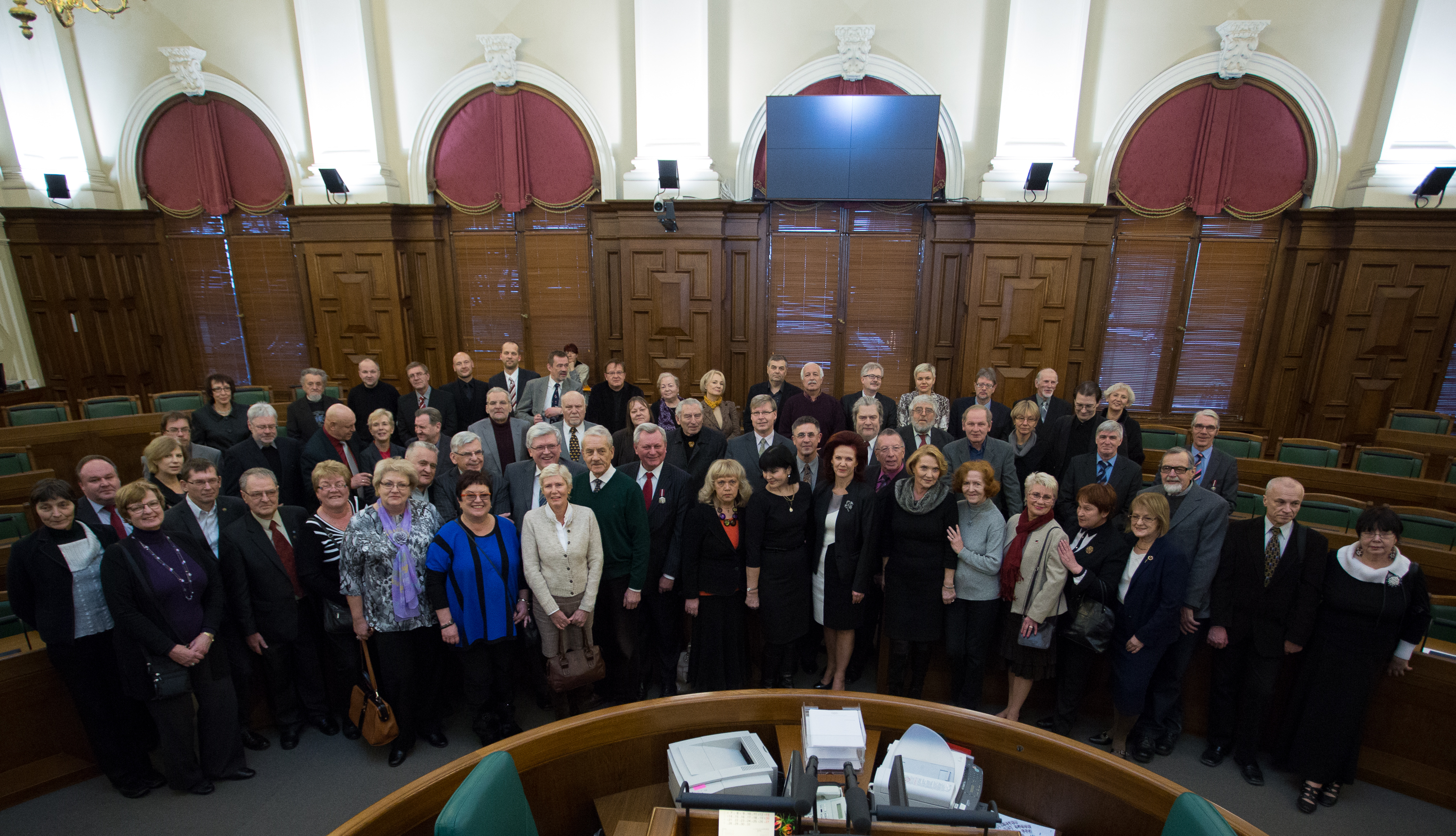 2013.gada 21.janvāris. Saeimas priekšsēdētāja Solvita Āboltiņa tiekas ar 1991.gada barikāžu laika žurnālistiem. Foto: Ernests Dinka, Saeimas Kanceleja